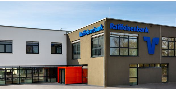 Neues Bankgebäude in der Gaisbeurer Straße 42 in Reute